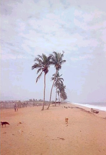 Abidjanvridi.jpg